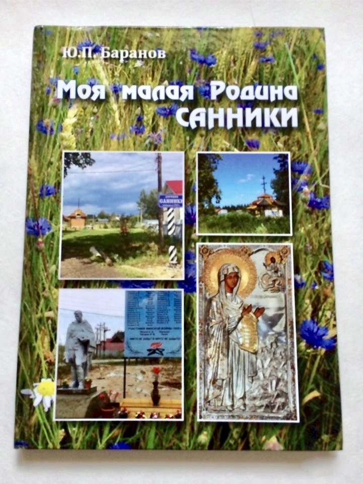 Подарочное издание книги Моя малая Родина Санники